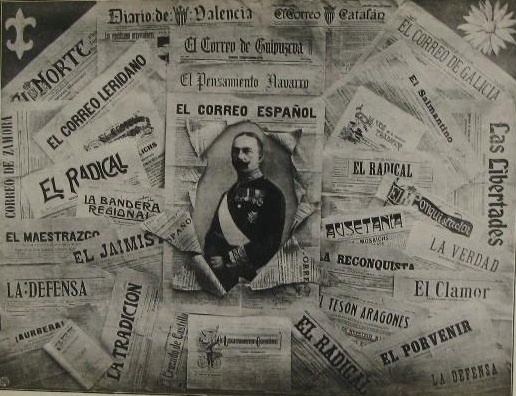 Postal de la prensa jaimista